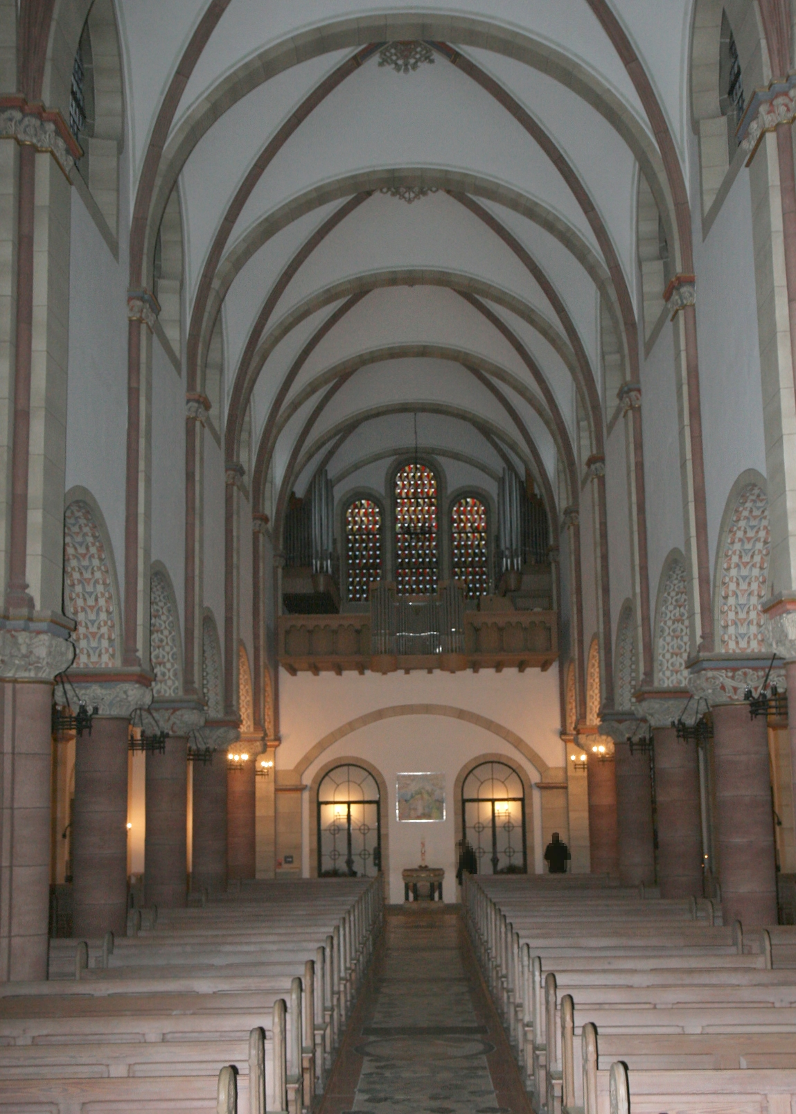 Kirche Sankt Mauritius und Gefährten in der Gemeinde Niederfischbach.